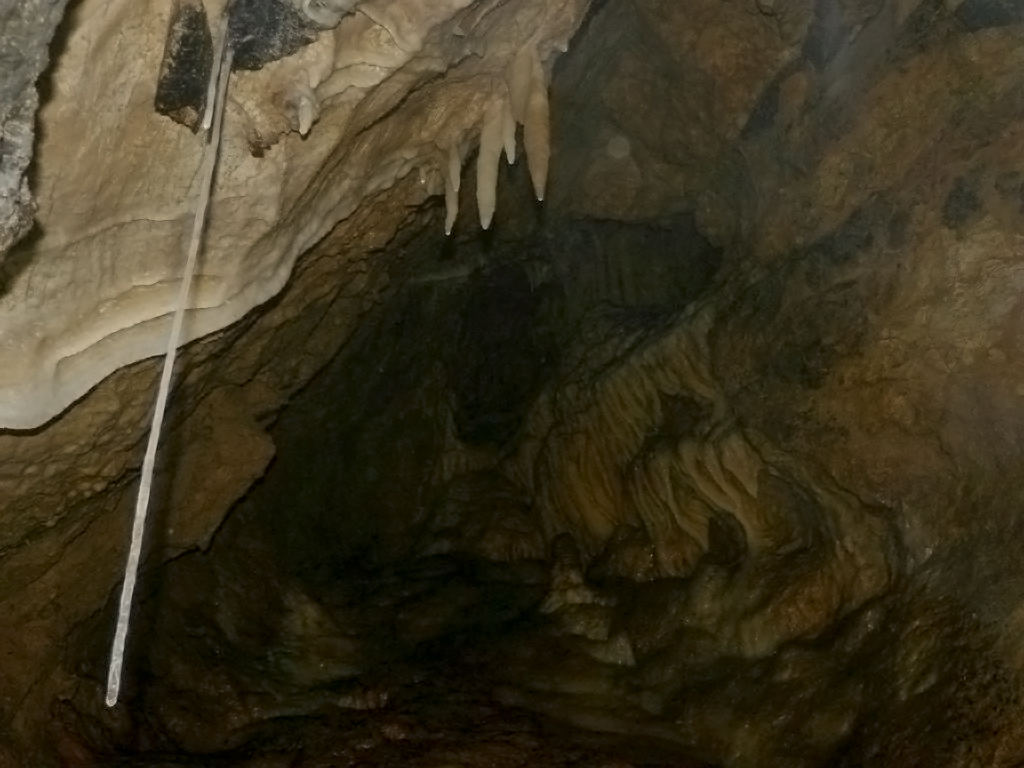 Cannula, la prima formazione calcarea che diventerà una stalattite.